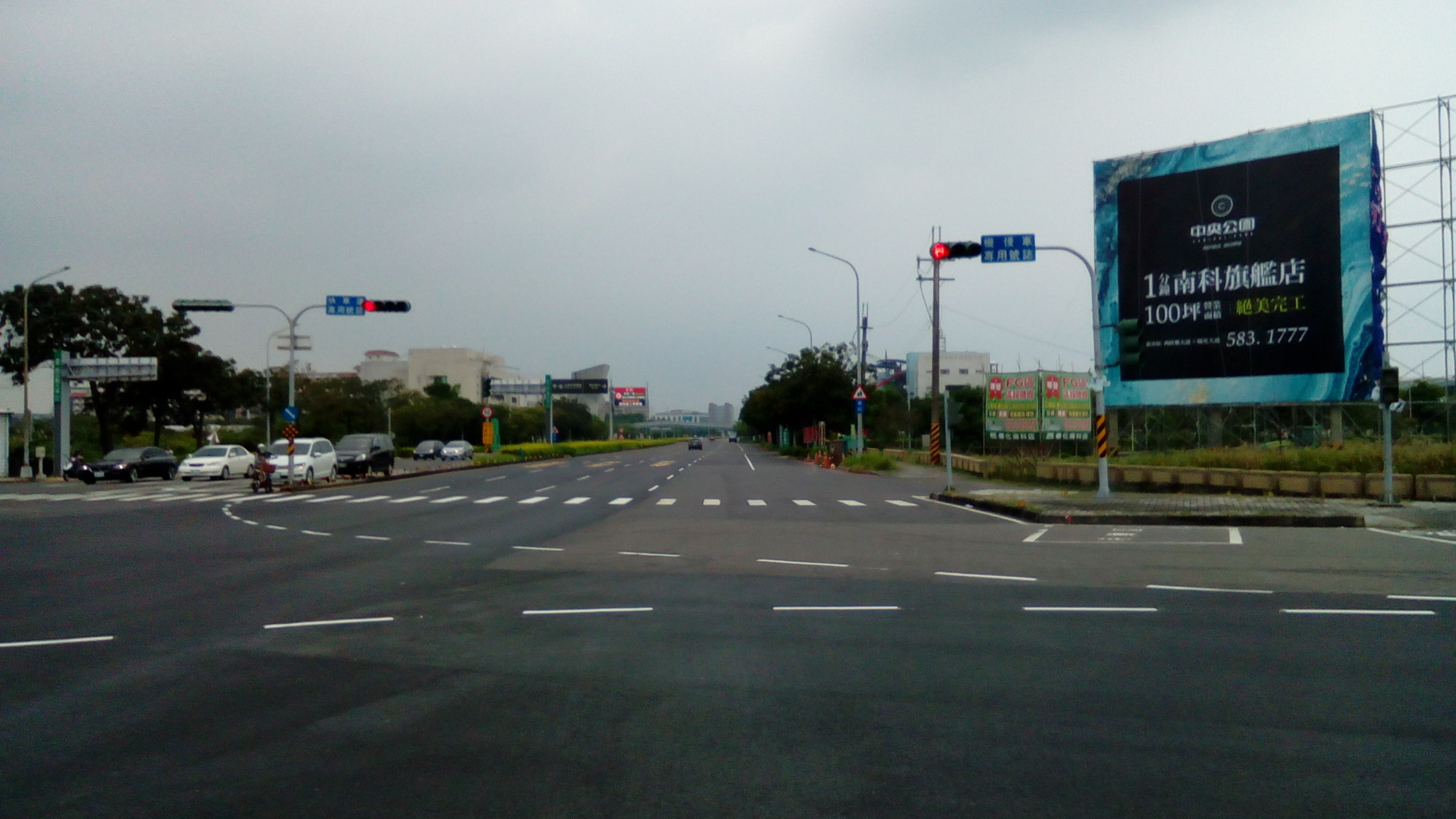 台南科學園區東入口